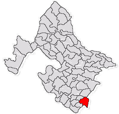 Categorie:Hărţi ale judeţului Mehedinţi